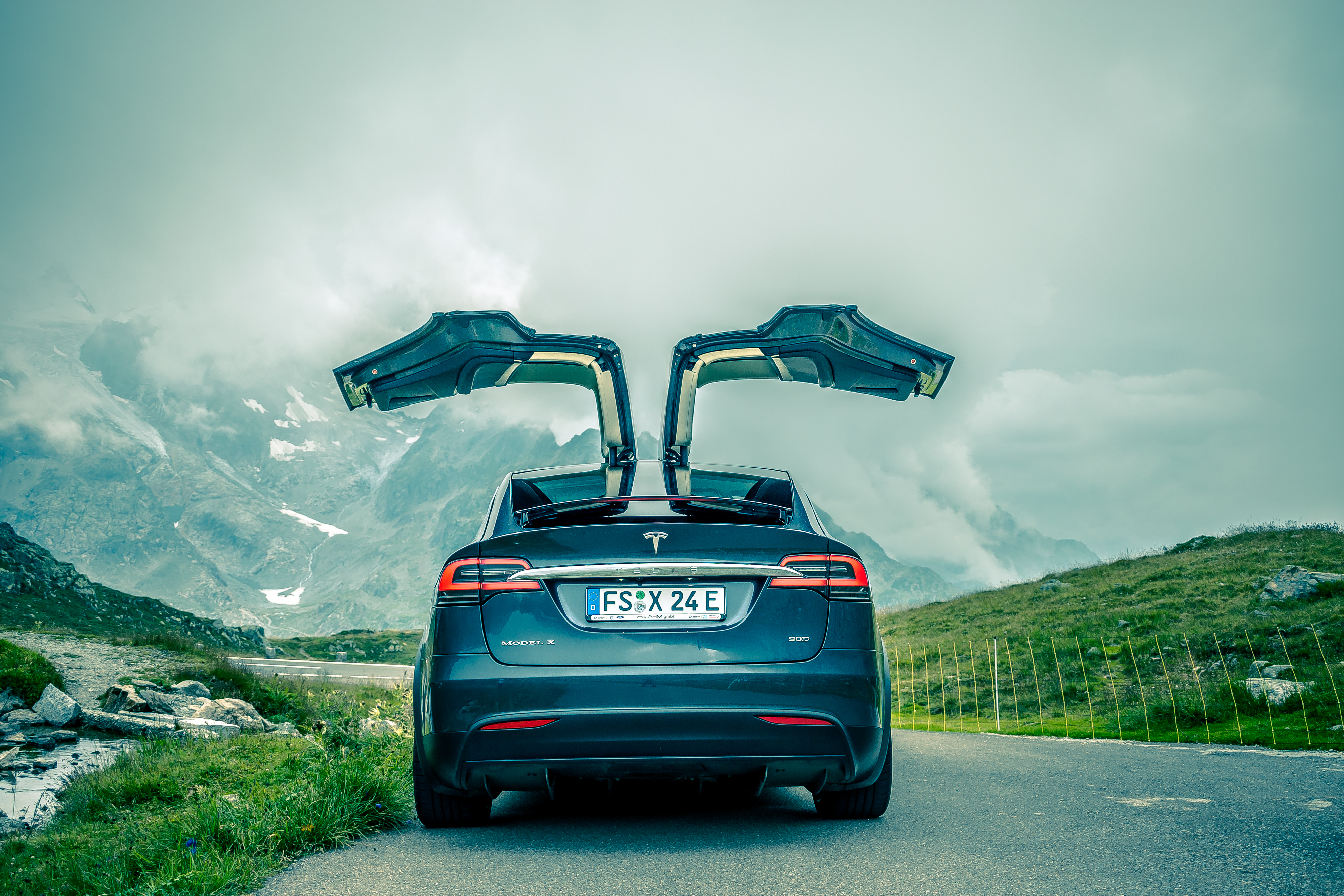 Roadtrip mit dem Tesla Model X 90D auf den Susten Pass und den Grimsel Pass in den schweizer Alpen.